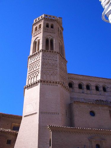 Torre mudejar de la Iglesia Parroquial de San Pedro Apostol